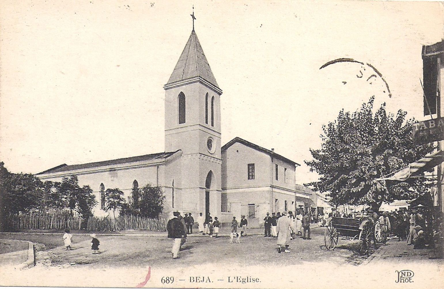 Église de Béja en Tunisie vers 1910